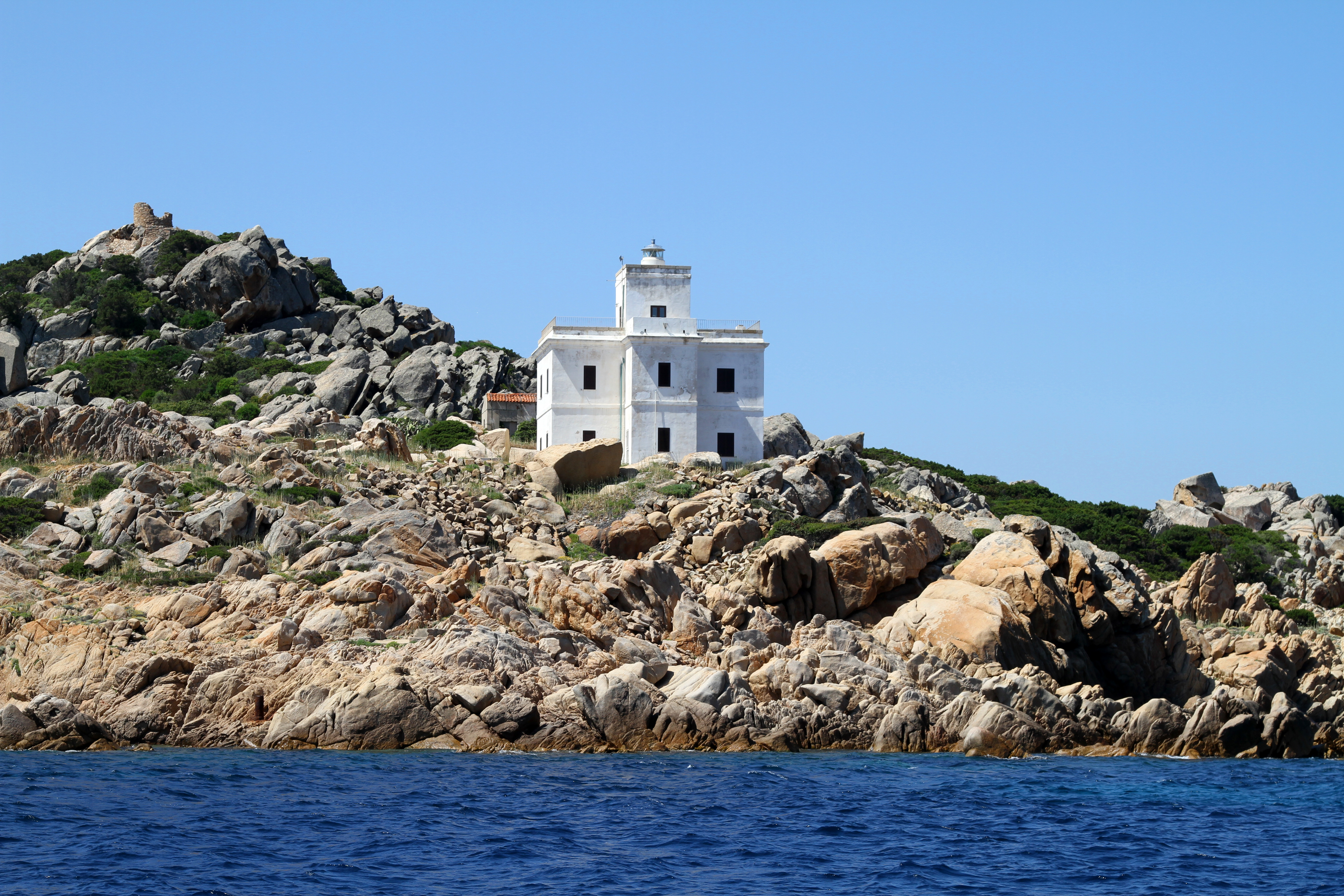 Il faro di Punta Sardegna